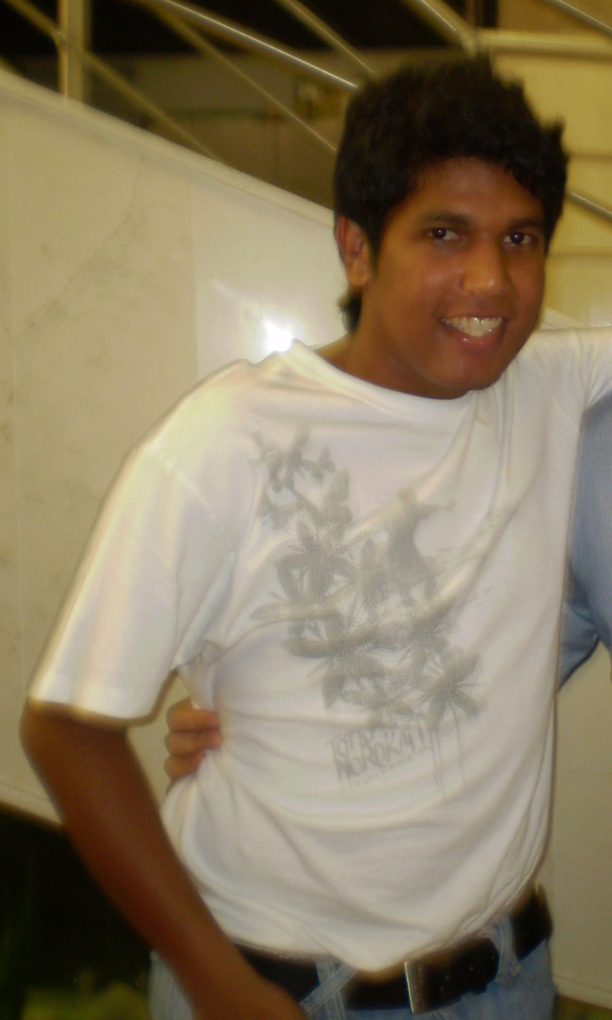 Keyner Morales cantante de Los K Morales